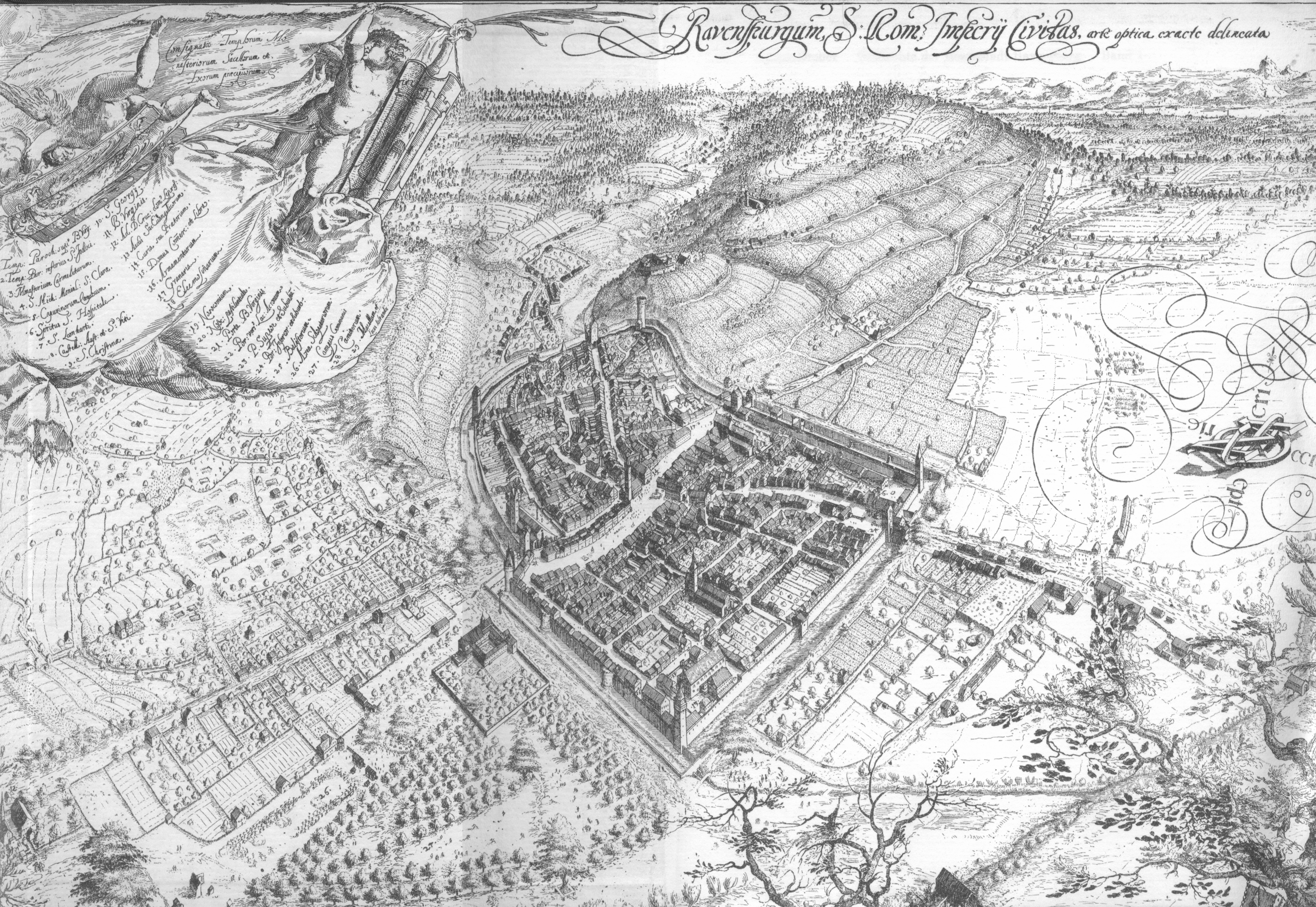 David Mieser und J. Morell: Ravensburg aus der Vogelschau von Nordwesten, 1630 (Schefold 6205); Vorbild für den vereinfachten Merian-Stich